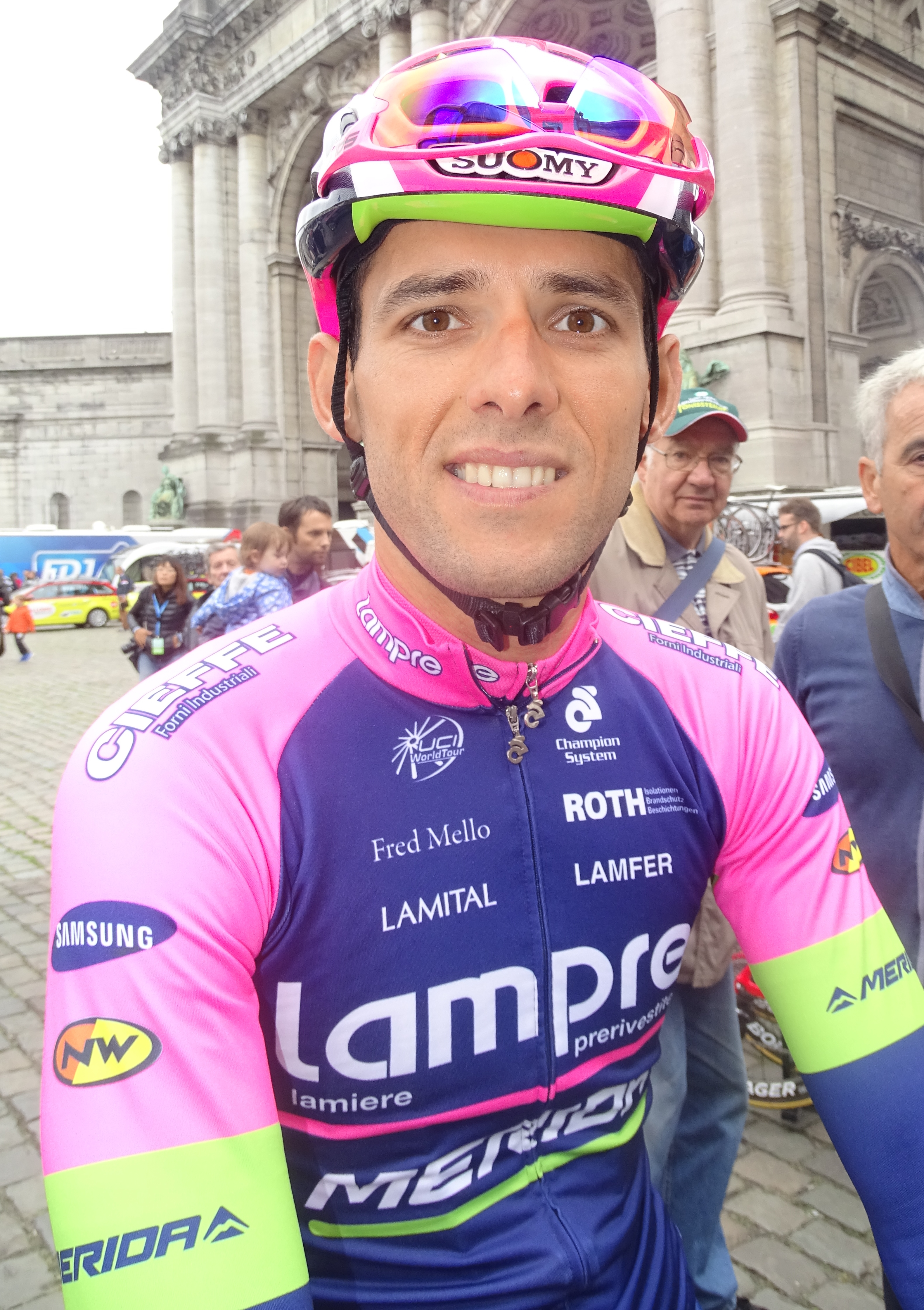 Brussels Cycling Classic 2015.